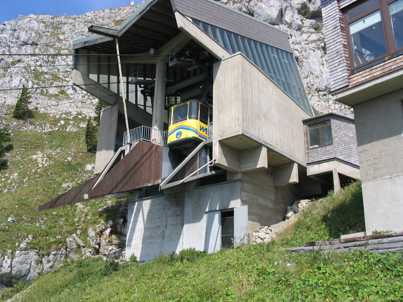 Seilbahn zum Wendelstein, Bergstation